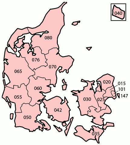 Karte der 13 Ämter (amter) und 3 Gemeinden, die bis 2006 gleichzeitig einen eigenen Amtsbezirk bildeten. Die angegebenen Nummern entsprechen den ISO-3166-2-Codes für Dänemark.